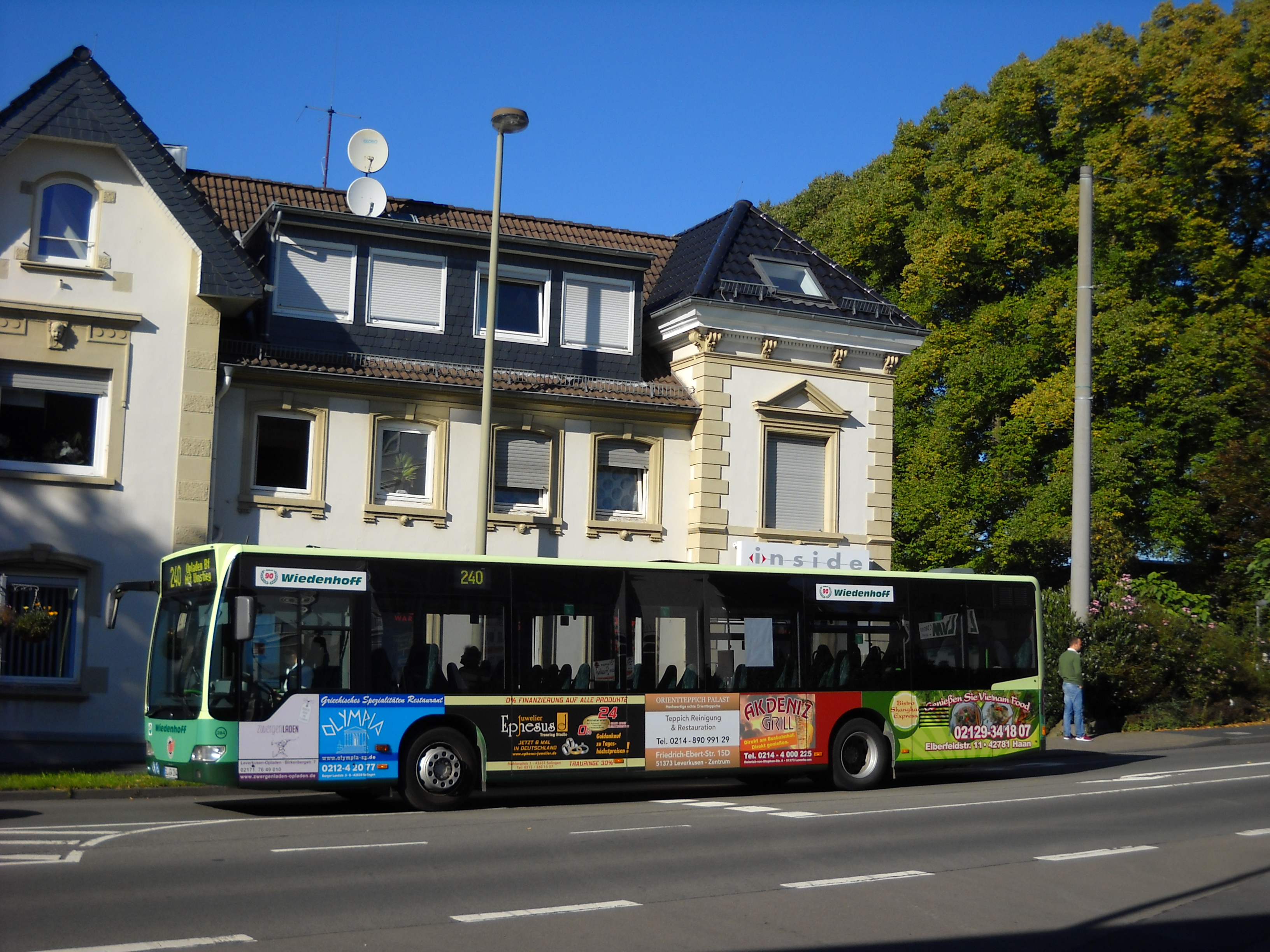 Innenstadt von Burscheid im Rheinland im September 2015.